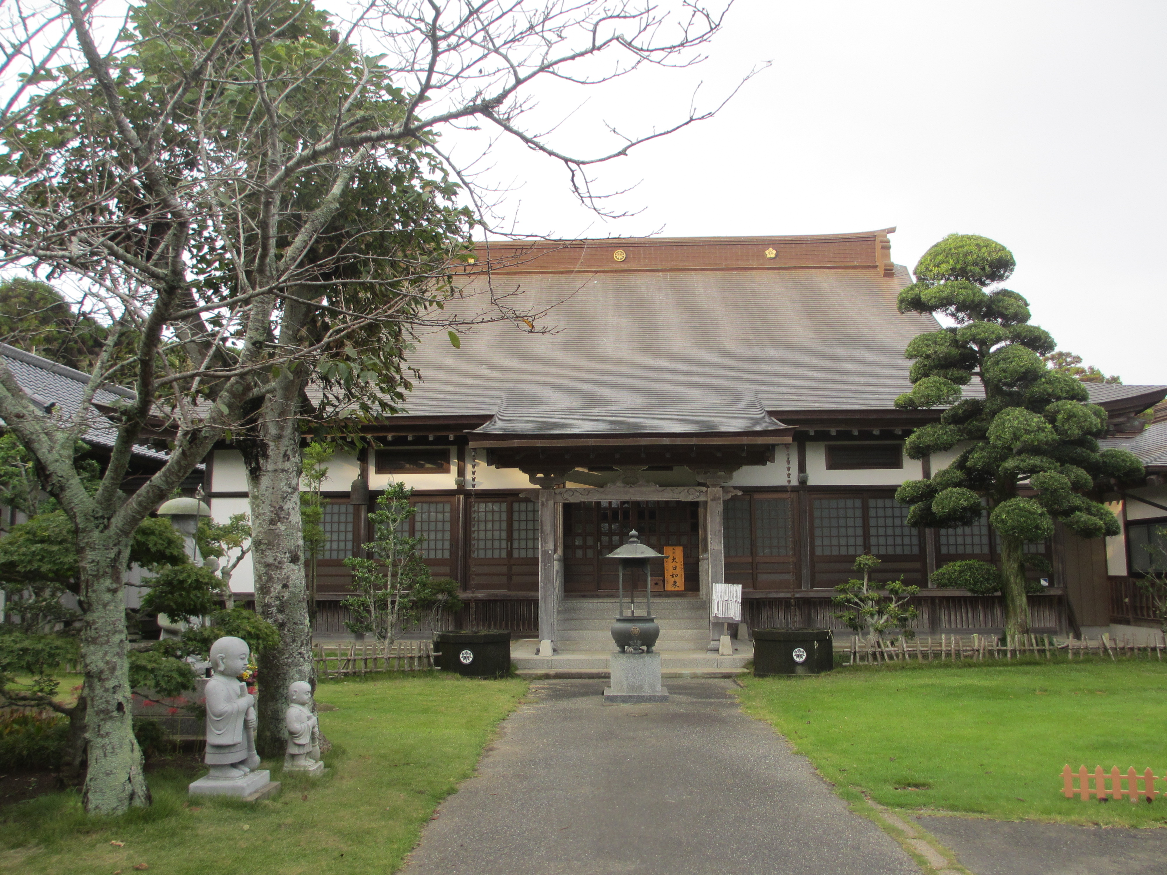 JR三保三隅総武本線、旭駅下車、木曽義昌公史跡公園線路挟み反対側